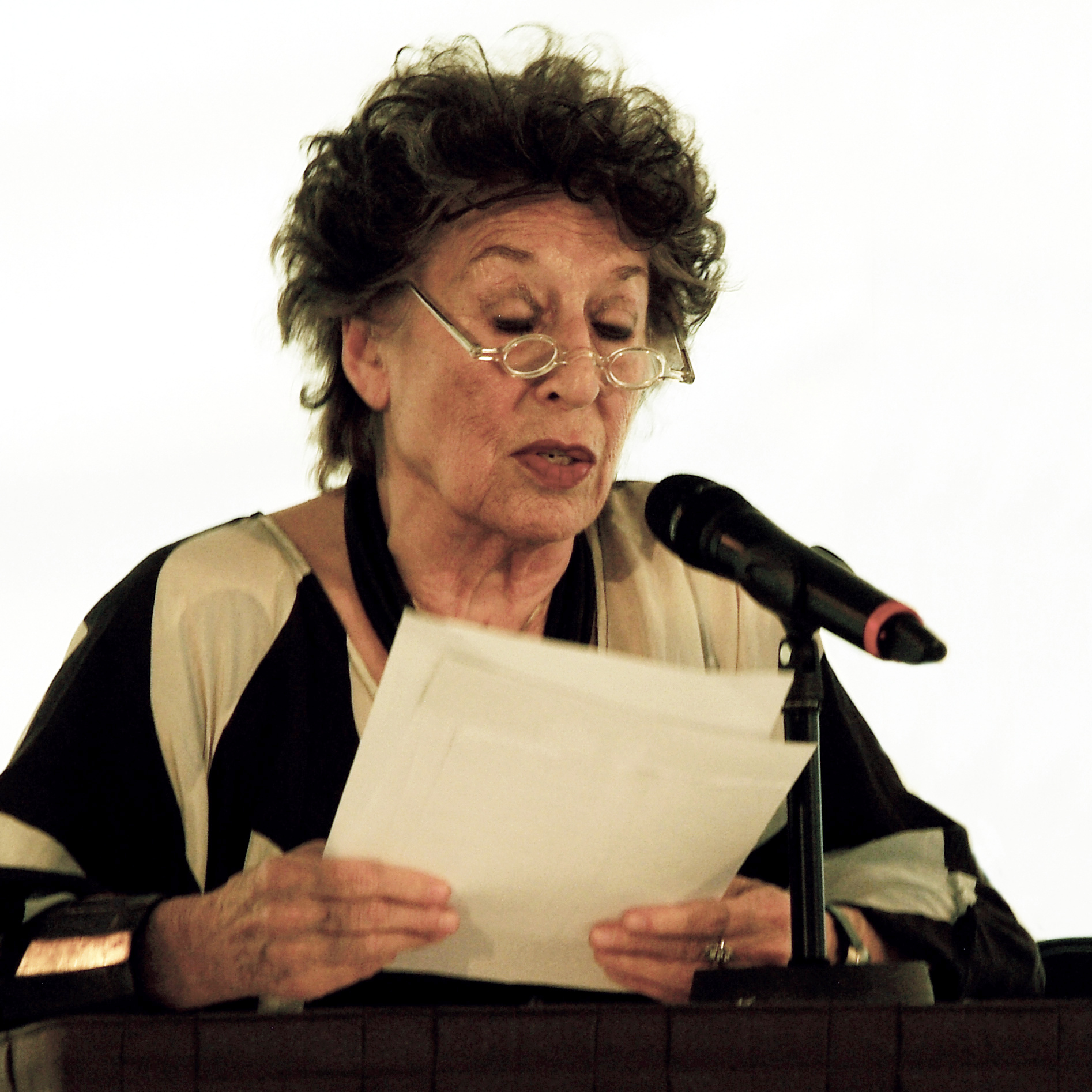 Gedenkveranstaltung zum 79. Jahrestag der Bücherverbrennungen in Hannover. Unter der Erkenntnis "... dort, wo man Bücher verbrennt, verbrennt man am Ende auch Menschen" fanden durch die Inititative "Hannover im Wort" verschiedene Veranstaltungen statt, darunter die am Opernplatz mit Lesungen verfolgter Autoren bzw. von Ihnen verbrannter Bücher.